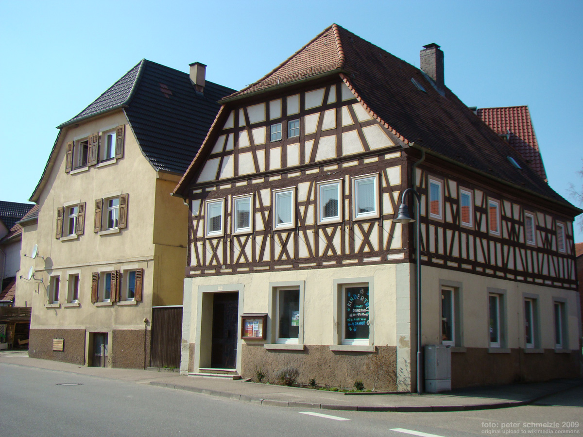 Altes Rathaus (rechts) in Berwangen